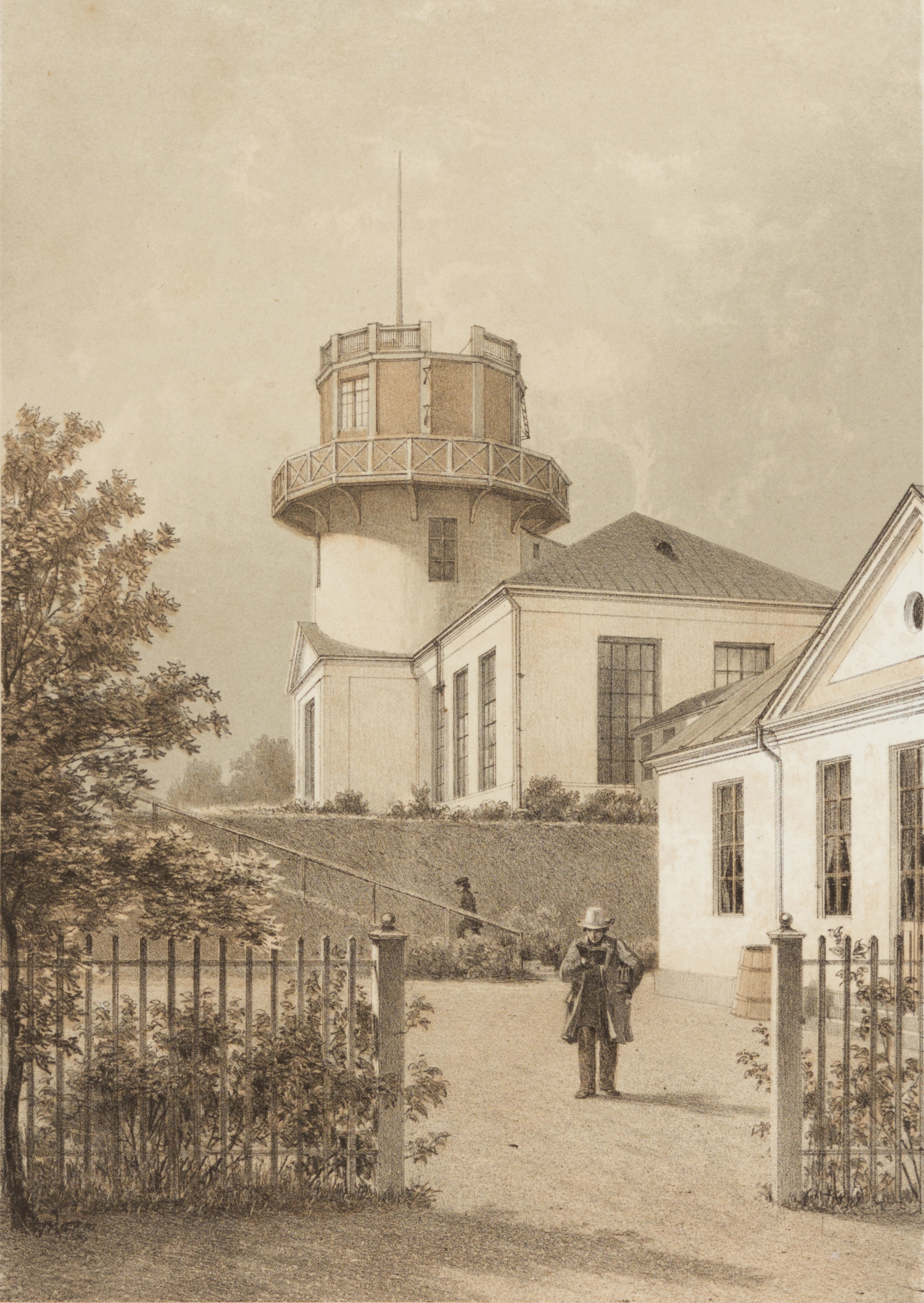 Tartu album. Tähetorn. MUIS: TKM TR 4038 H 31:7